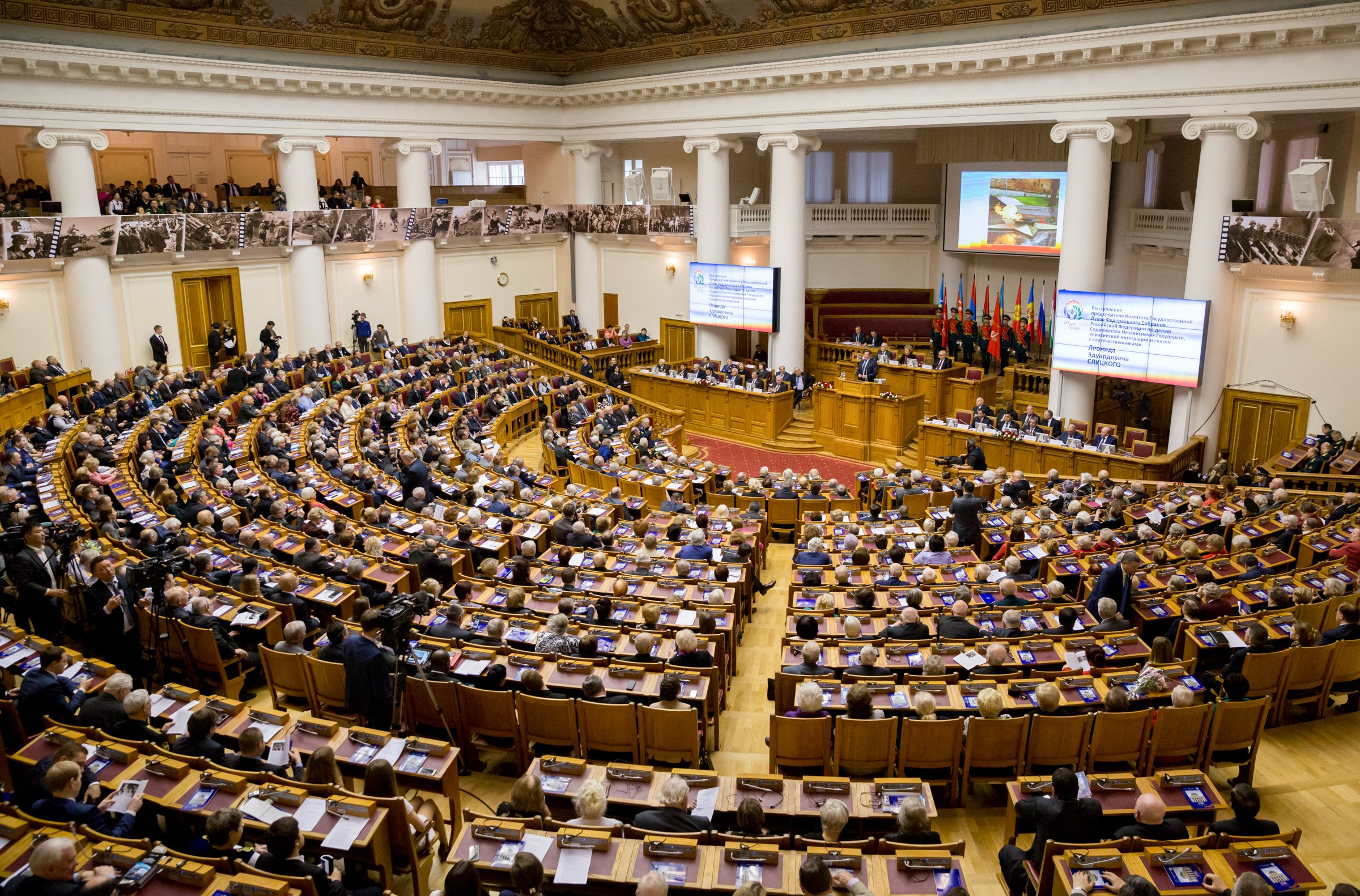 Пленарное заседание Межпарламентской ассамблеи СНГ 17 апреля 2015 года, посвященное 70-летию Победы в Великой Отечественной войне